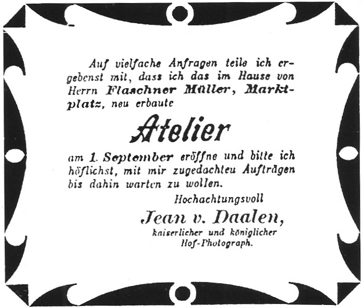 Anzeige Jean van Daalens in der »Remszeitung« vom 9.8.1890, in der er die Eröffnung seines Ateliers in [Schwäbisch] Gmünd am 1. September ankündingt.